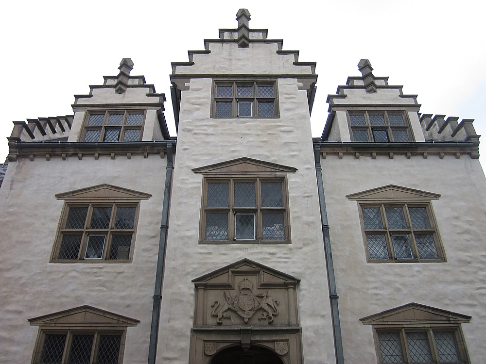 Plas Mawr Conwy UK